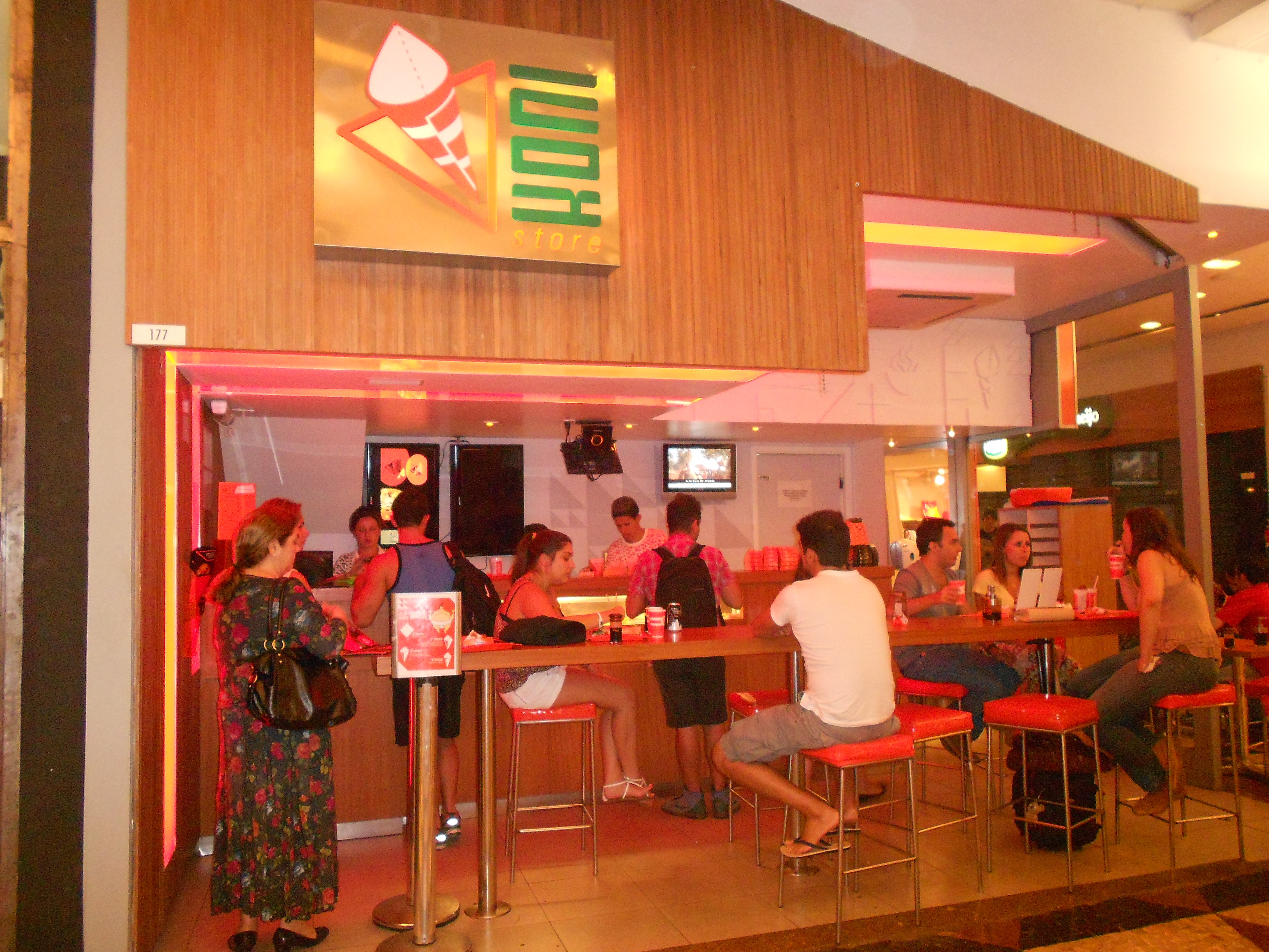 Filial da Koni Store no Shopping da Gávea, Gávea, Rio de Janeiro, Brasil.